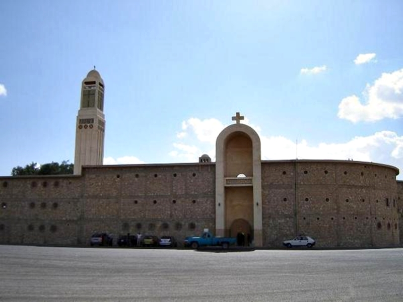 بوابة لدير الأنبا مقار، وادي النطرون